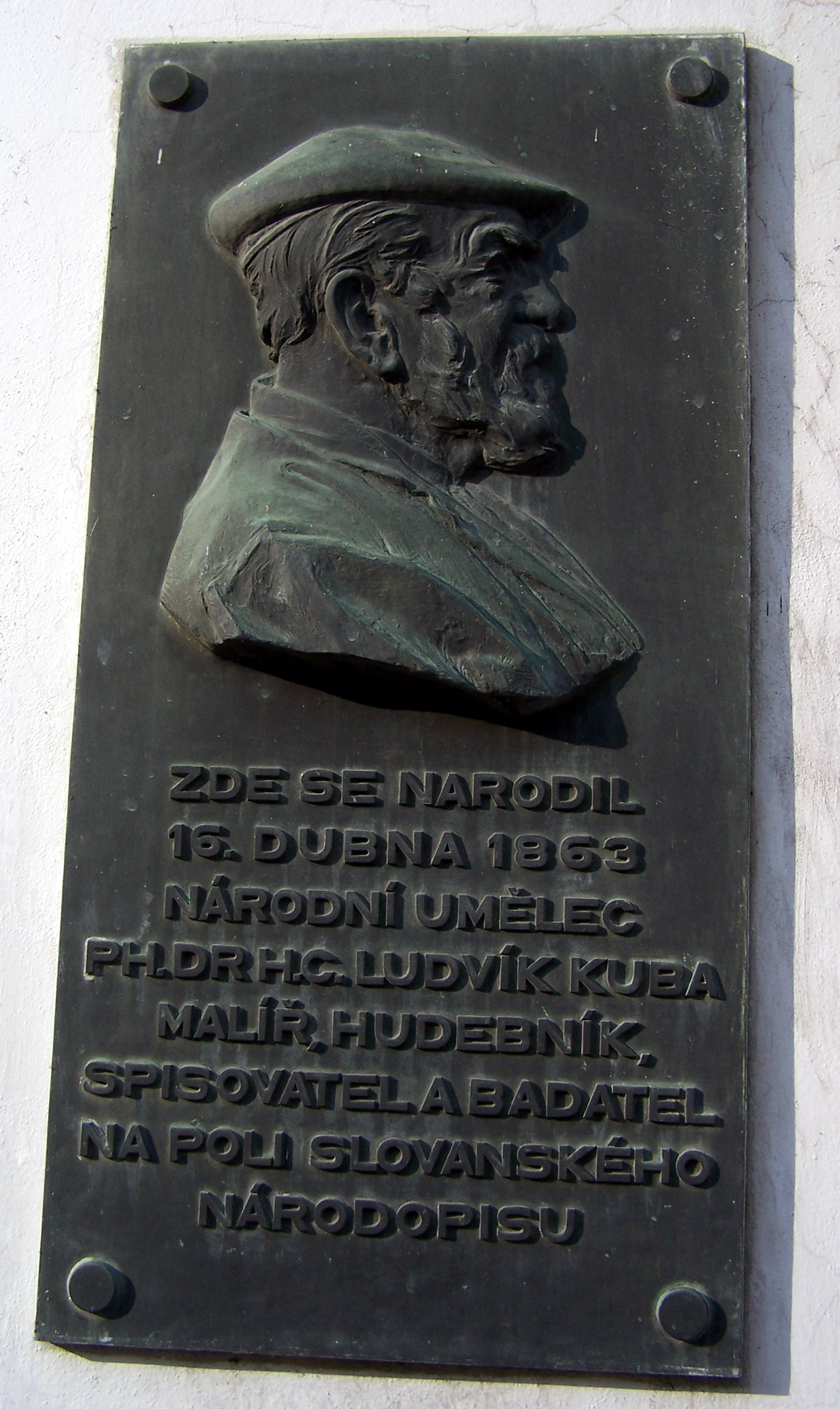 Pamětní deska Ludvíka Kuby na místě jeho rodného domu (kde??).